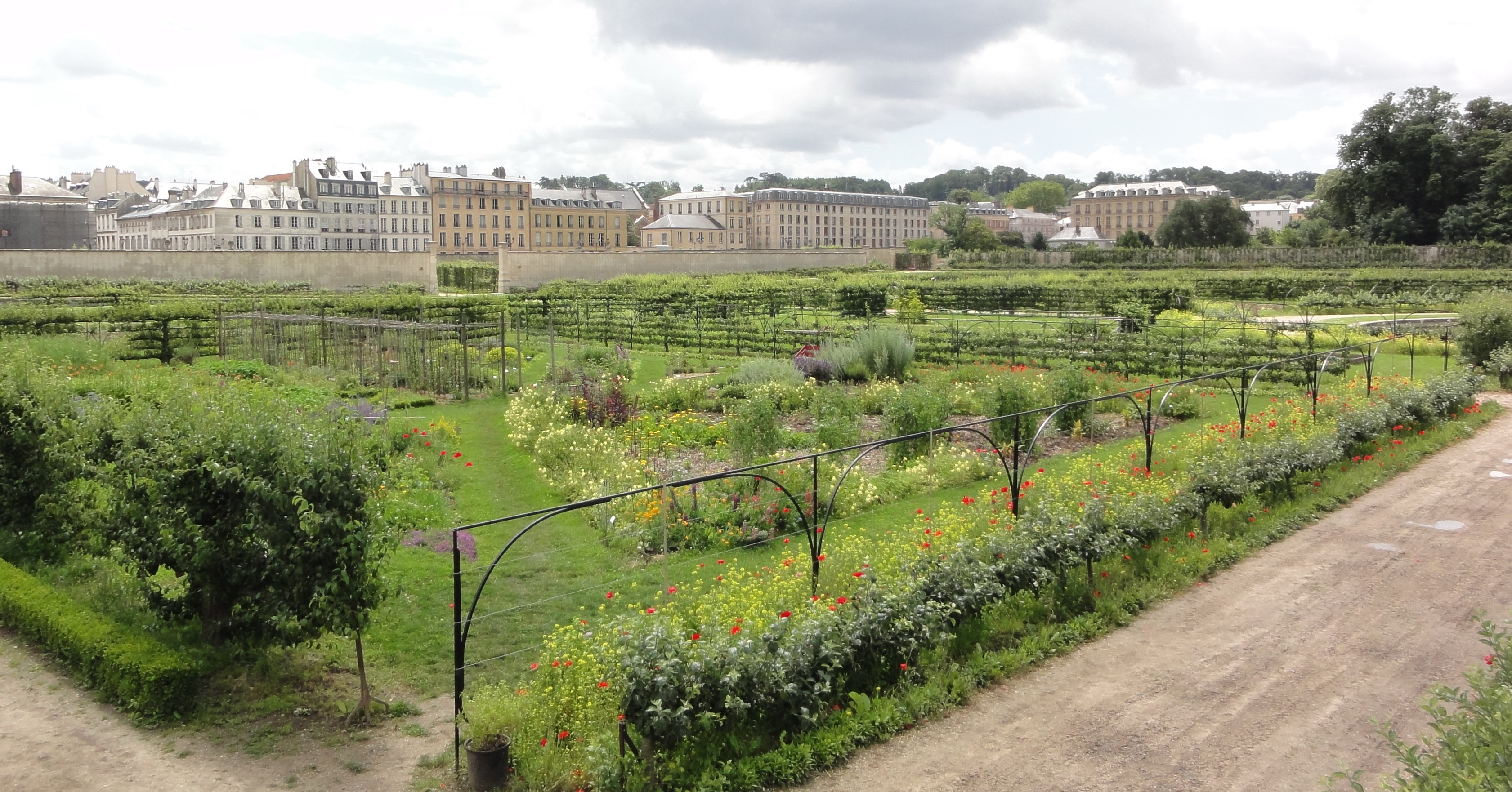 Potager du roi - Grand Carré